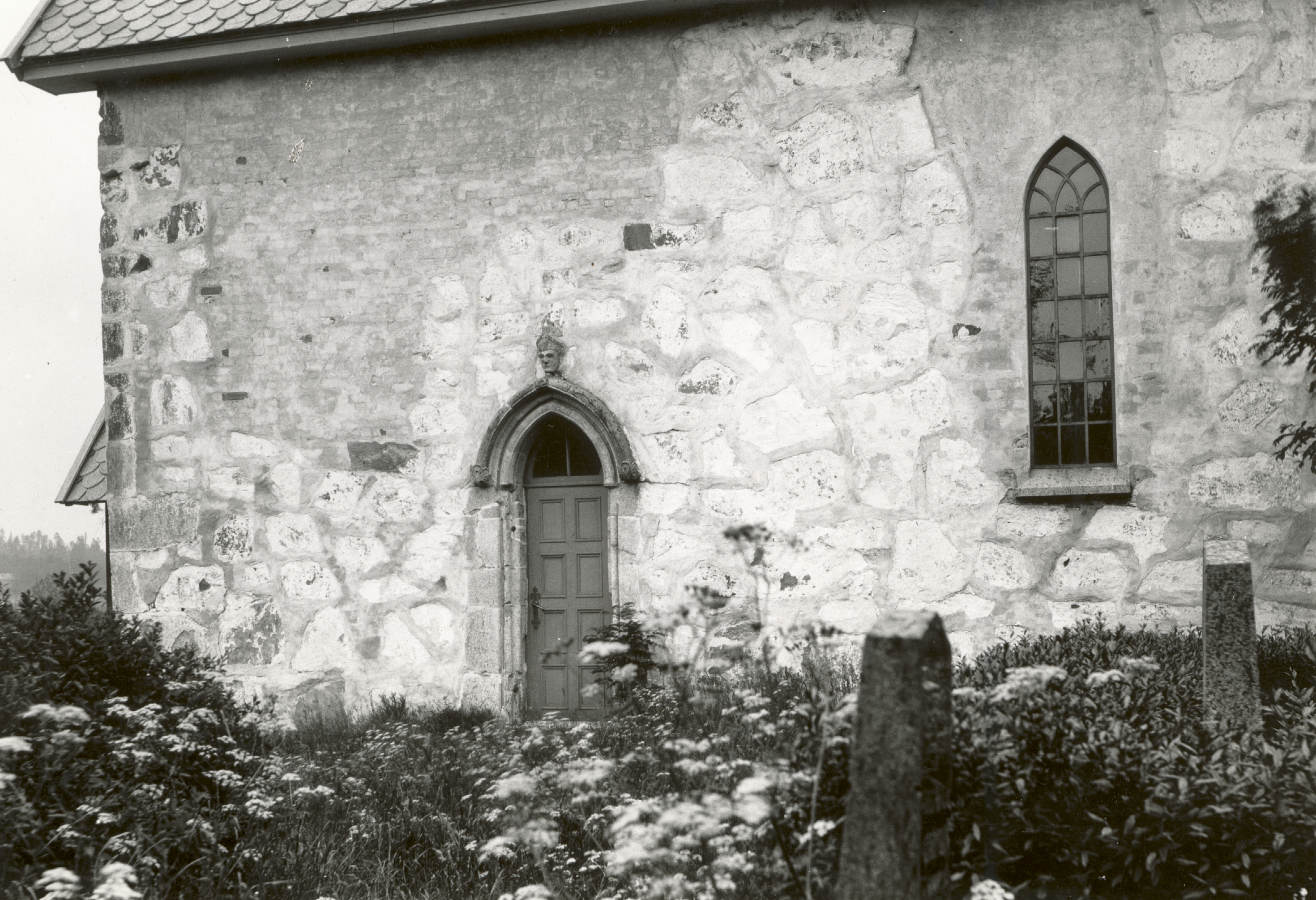 Øyestad kirke, Aust-Agder Sydportal This image on crowdsourcing geotagging platform Fotodugnad